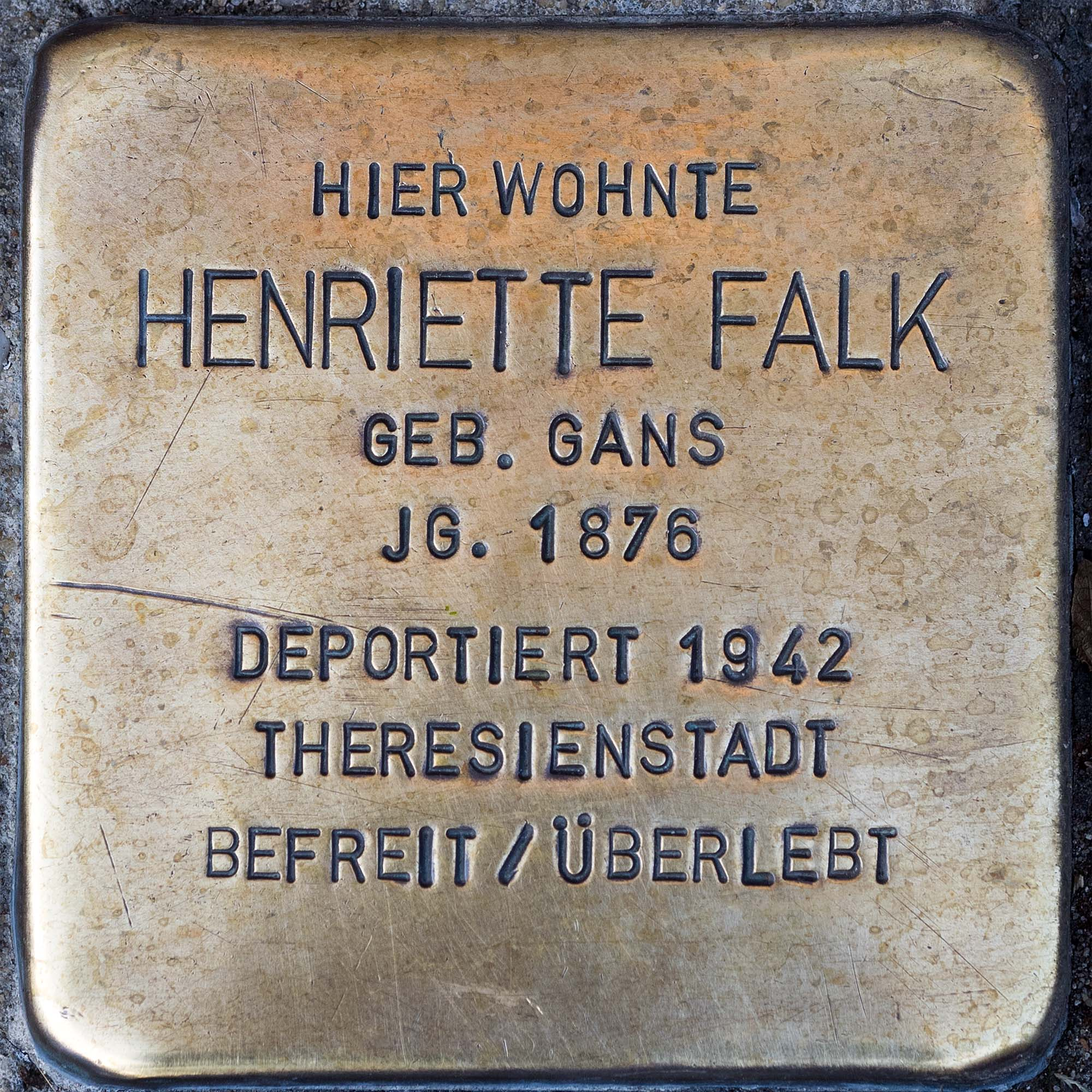 2016 Stolpersteine Toevo Henriette Falk